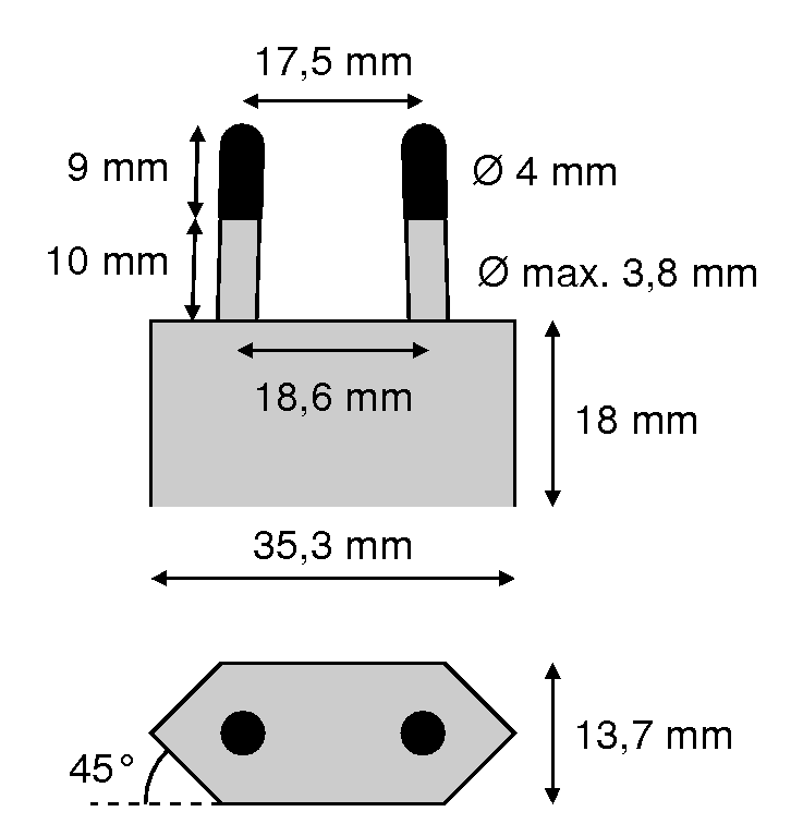 Von Montauk selbst gezeichnet.